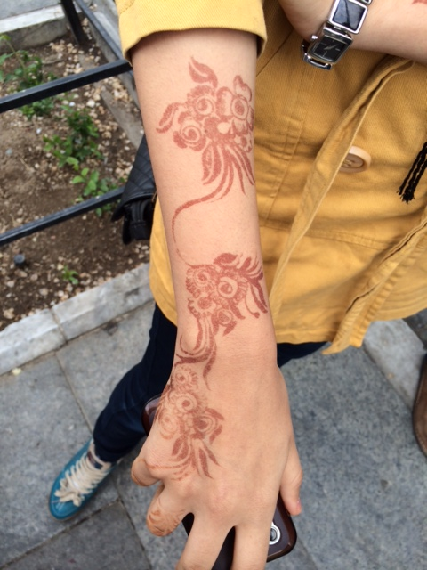 حنابندان